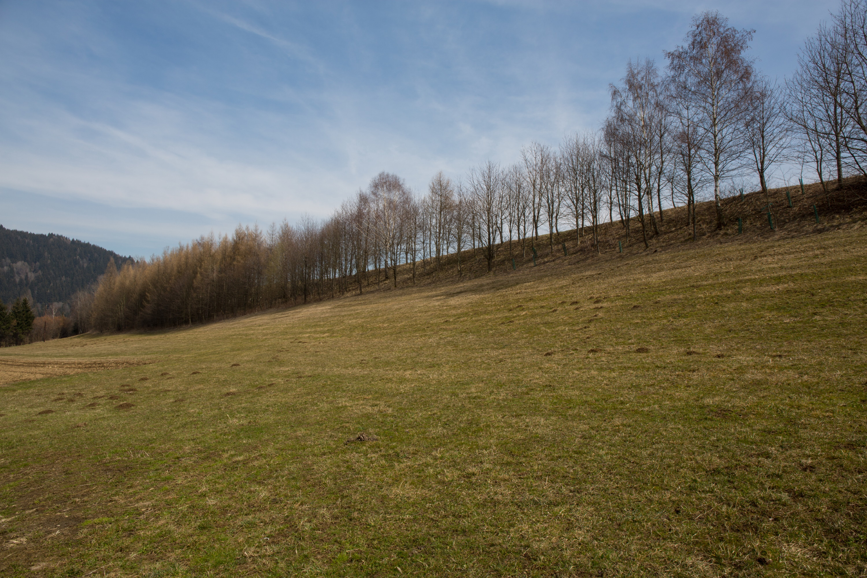 Gletschergrundmoräne bei Grünhübl-Watzenbichl This media shows the natural monument in Styria with the ID 746.